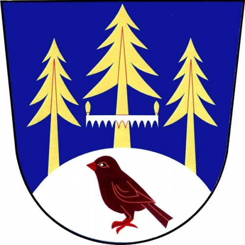 Znak, Drozdov, okres Šumperk